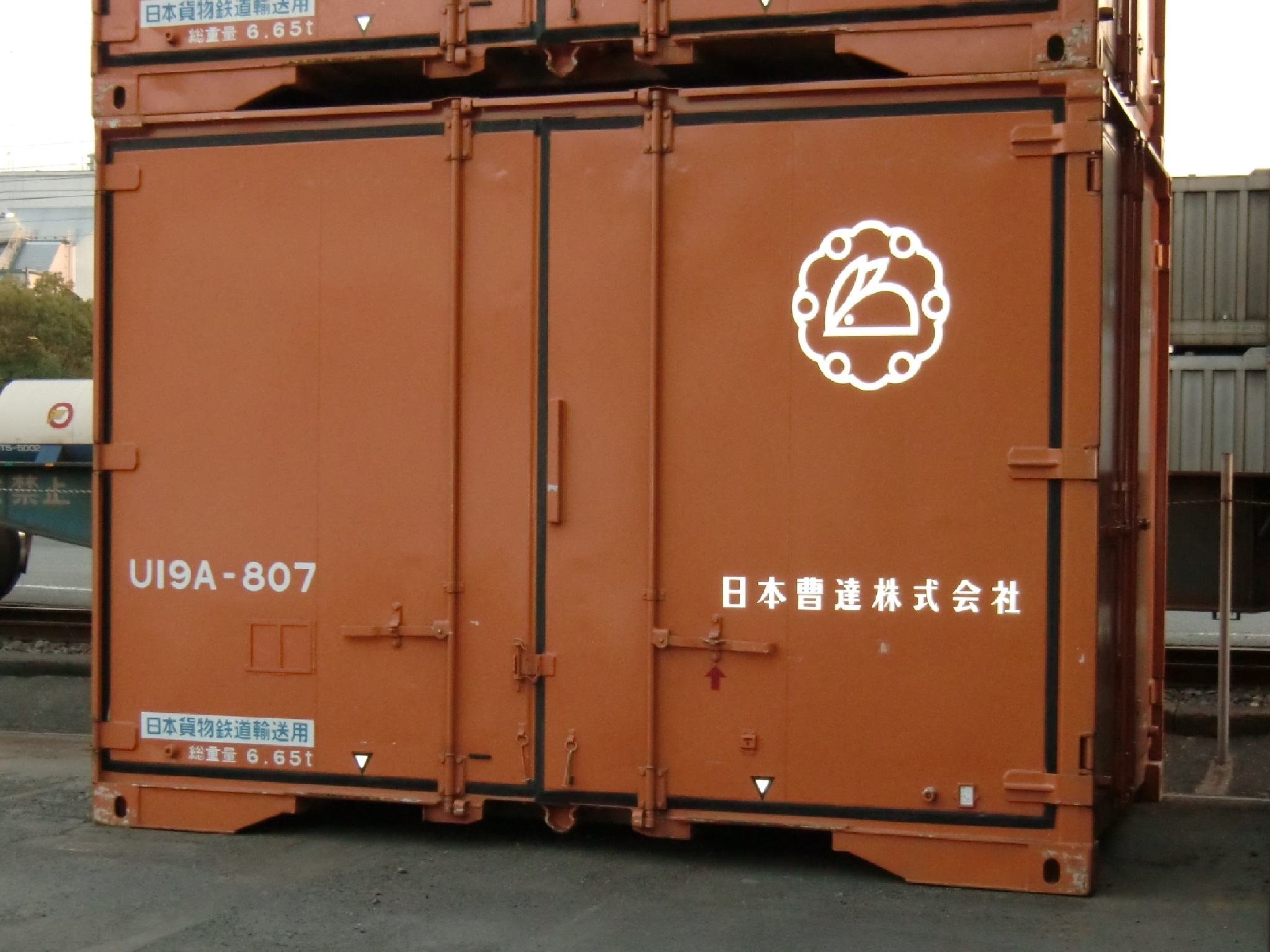 JR貨物より日本国内での鉄道輸送用に承認登録されて、民間企業が所有及び使用している 「 鉄道私有コンテナ 」 。 撮影地＝【岡山／東水島貨物駅